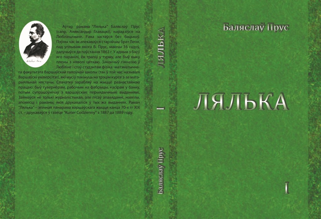 Вокладка "Лялькі" выдадзенай на беларускай мове